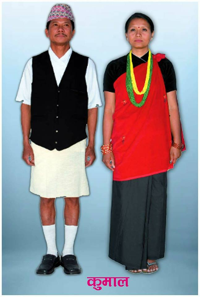 नेपाली: Kumal cultural dress